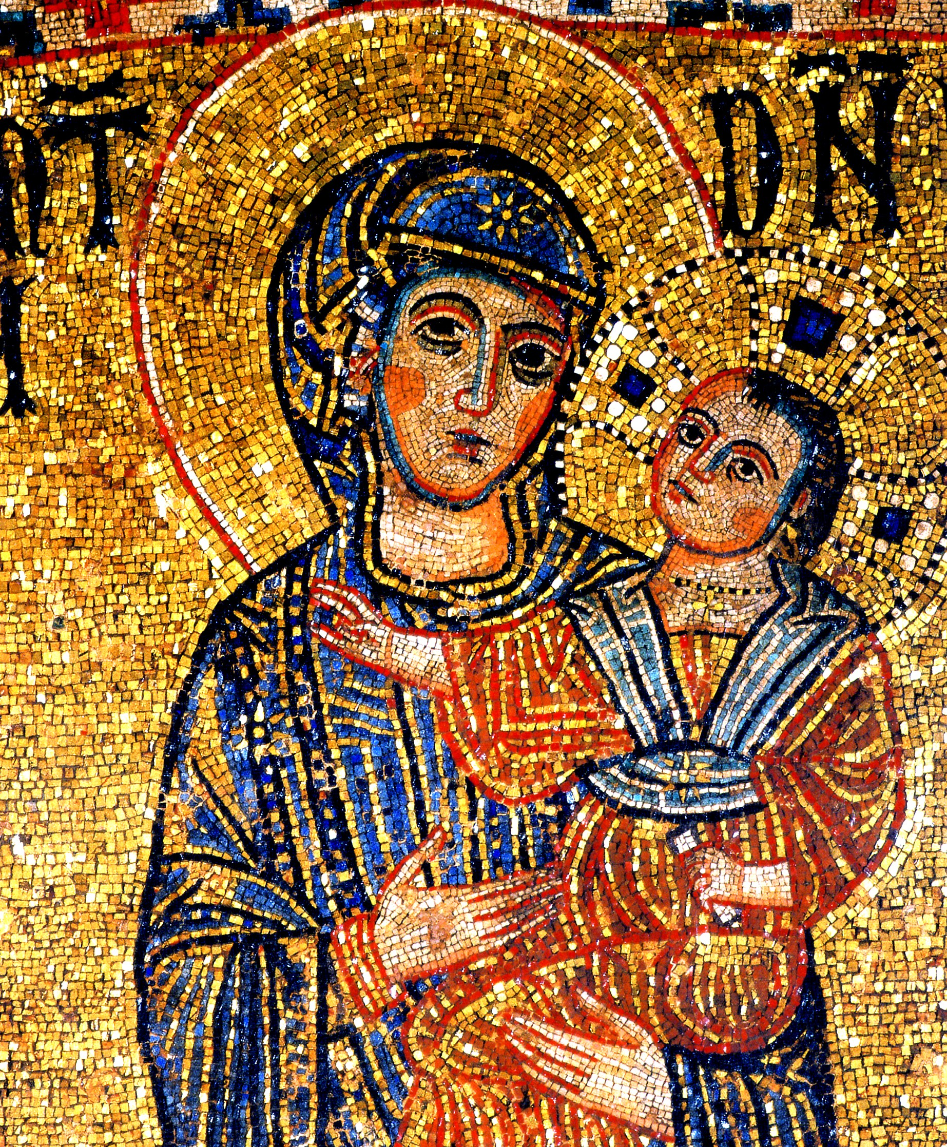 RÓMA, S. PAOLO FUORI LE MURA: Mozaik ikon-részlet a XIII. századból Foto: Kiss T. 2005.04.10.(Kit36) Eredeti: CHINON CS-4/50-200 zoom/FUJI Superia 400+flash. Szerk.: CANOSCAN F-500 (dig.+kivágás)